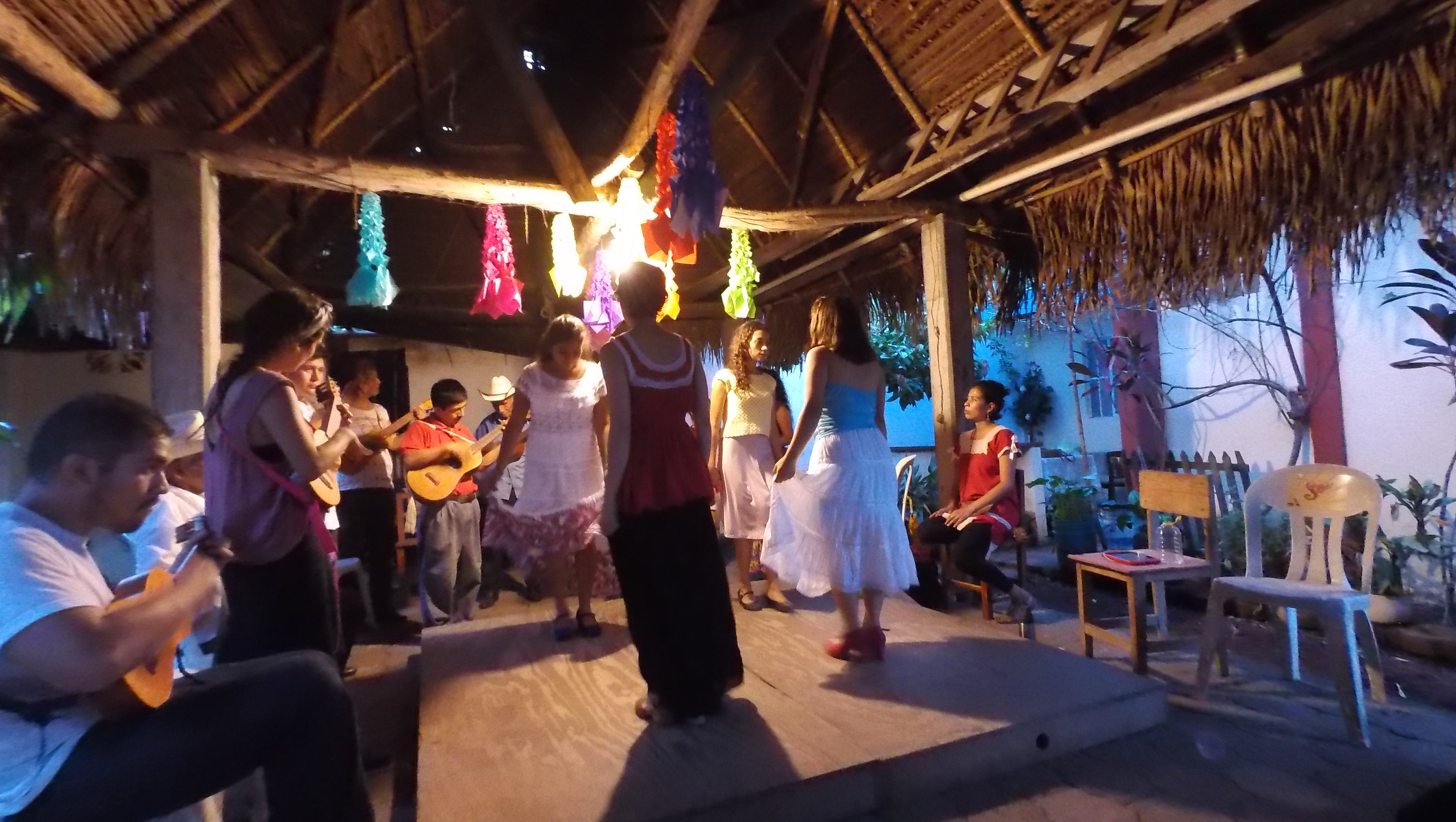 En Santiago Tuxtla.